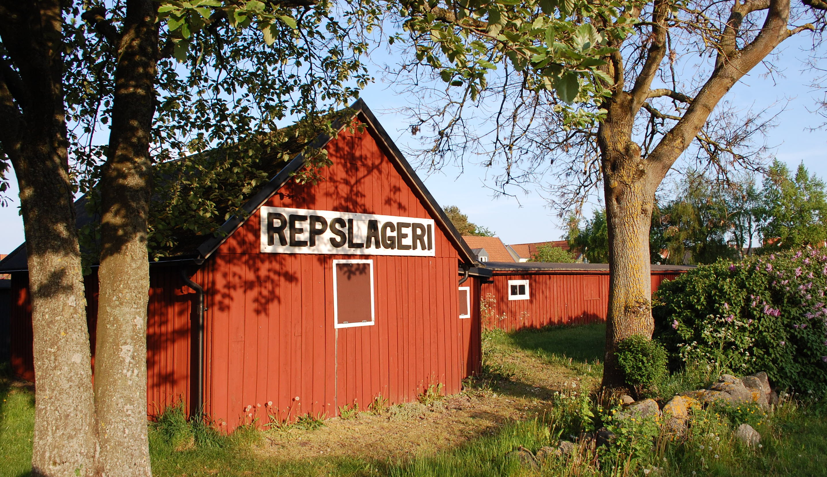 Seilerei Malmström in Ahus